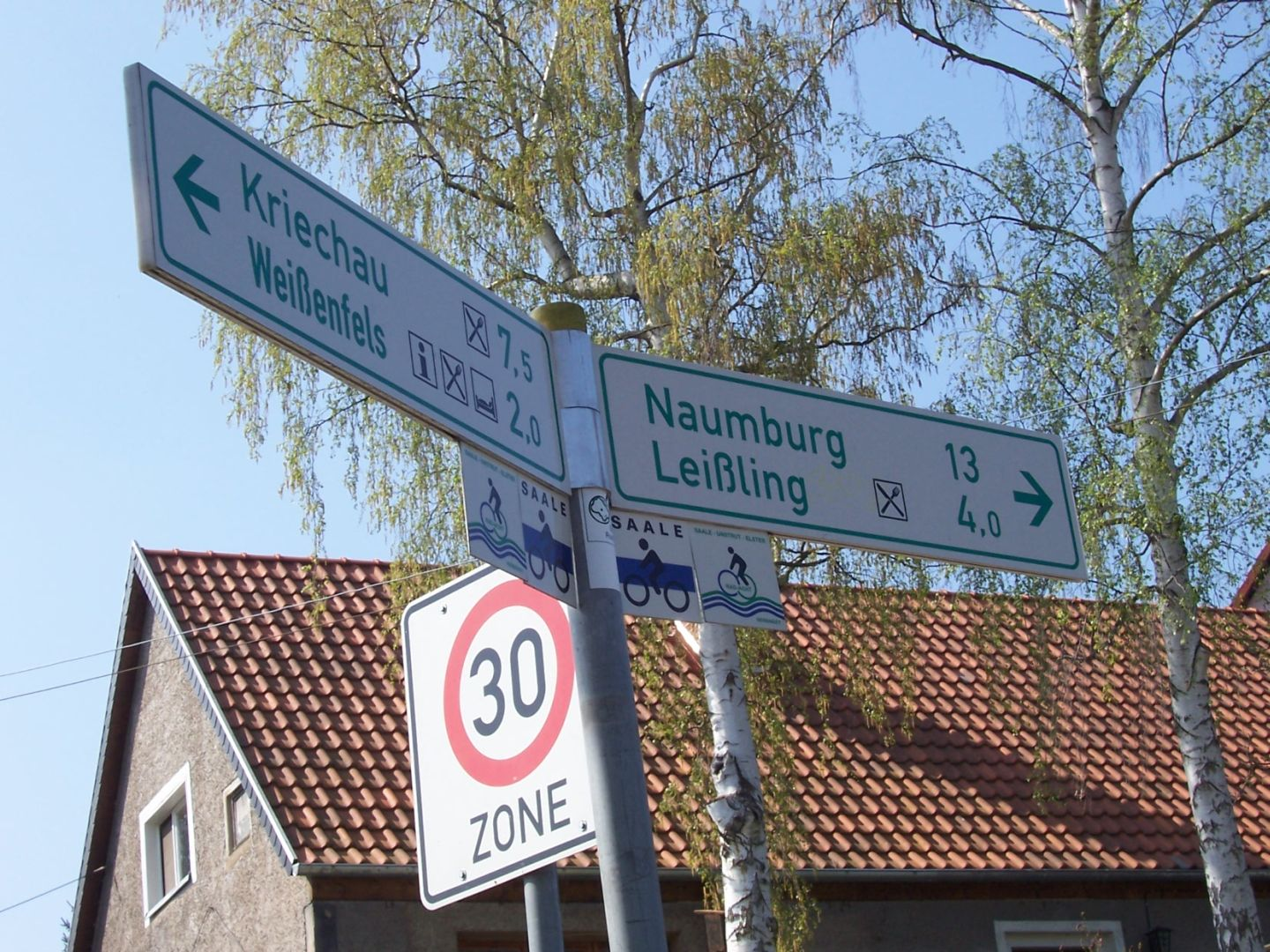 Wegweiser am Saale-Radweg zwischen Weißenfels und Leißling